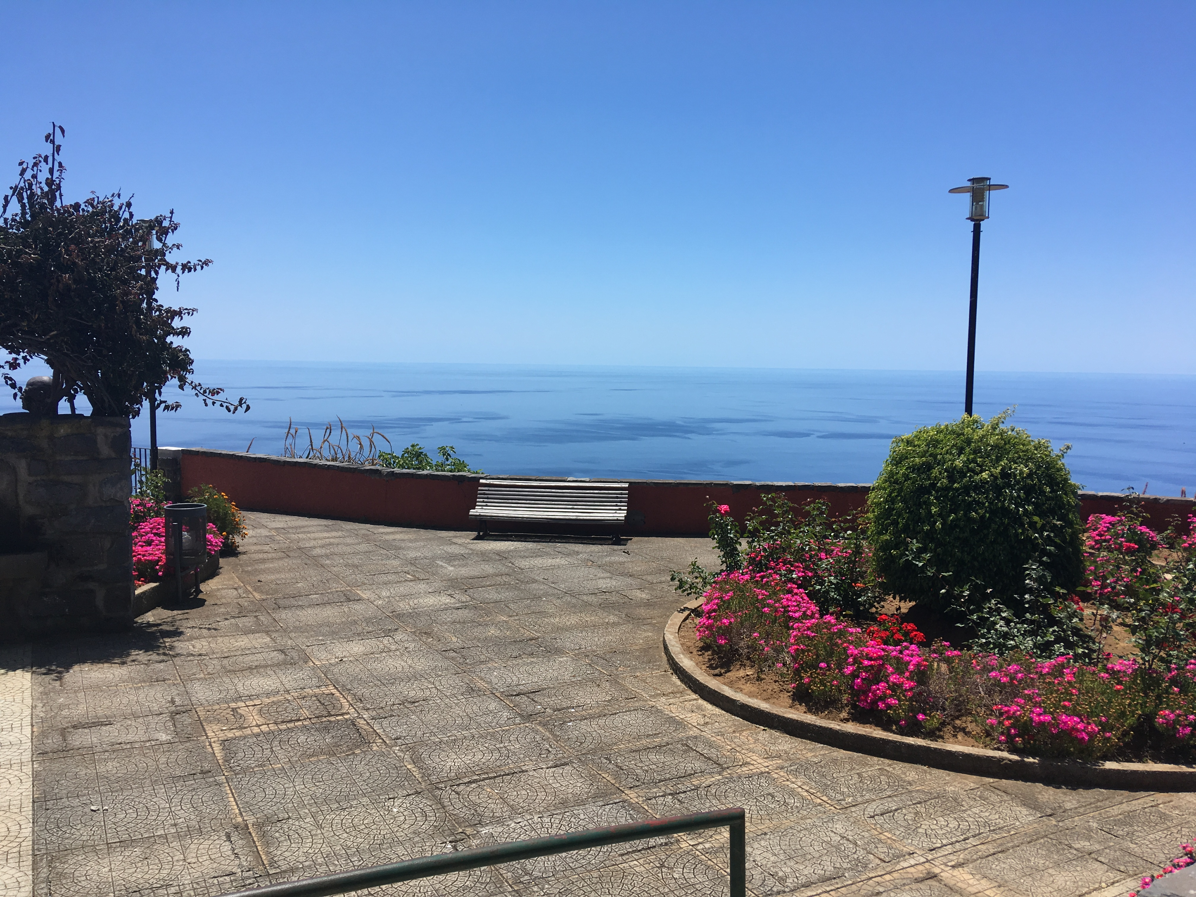 A vista do Miradouro do Campanário.